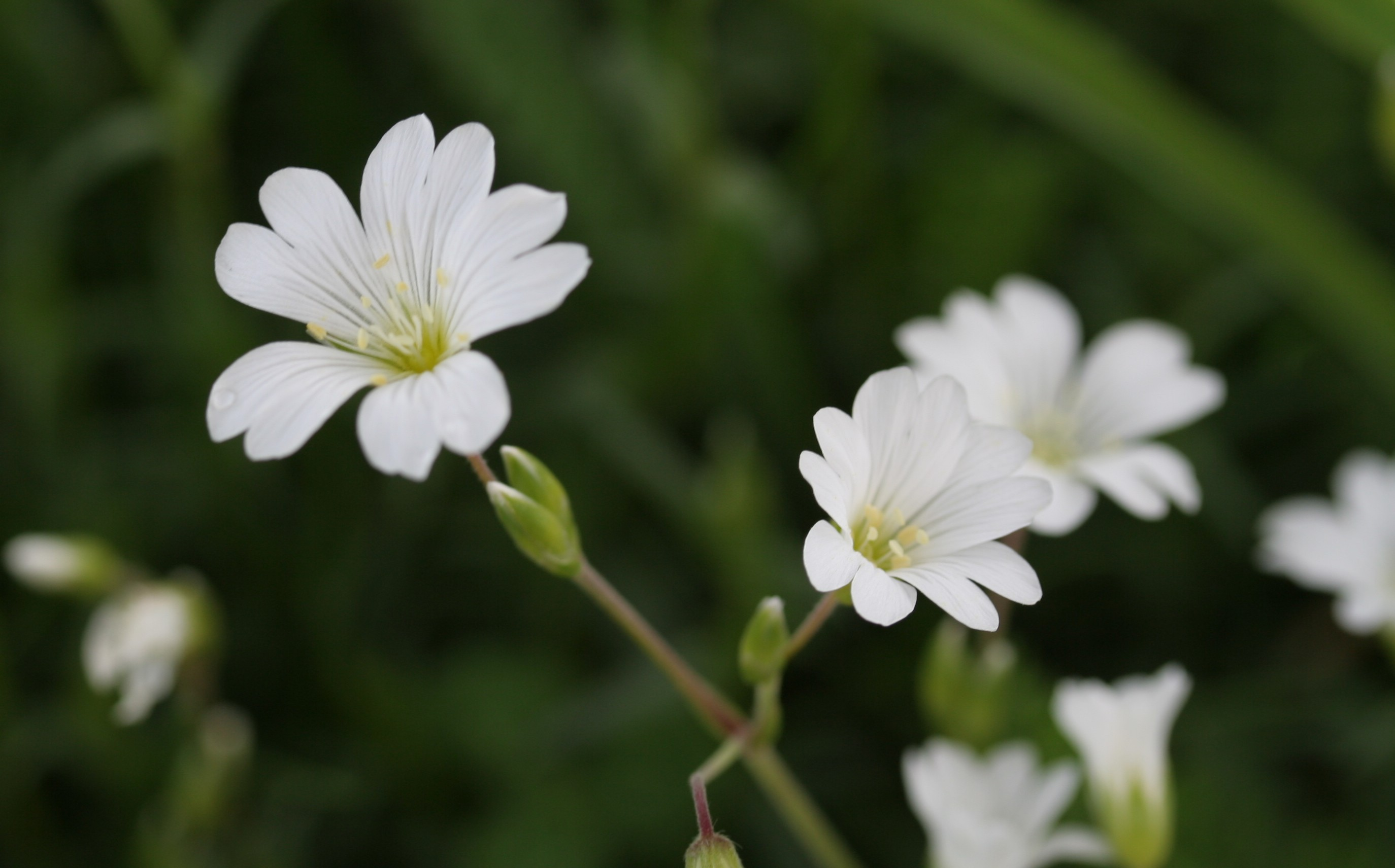 Cerastium arvense (Peverina a foglie strette)